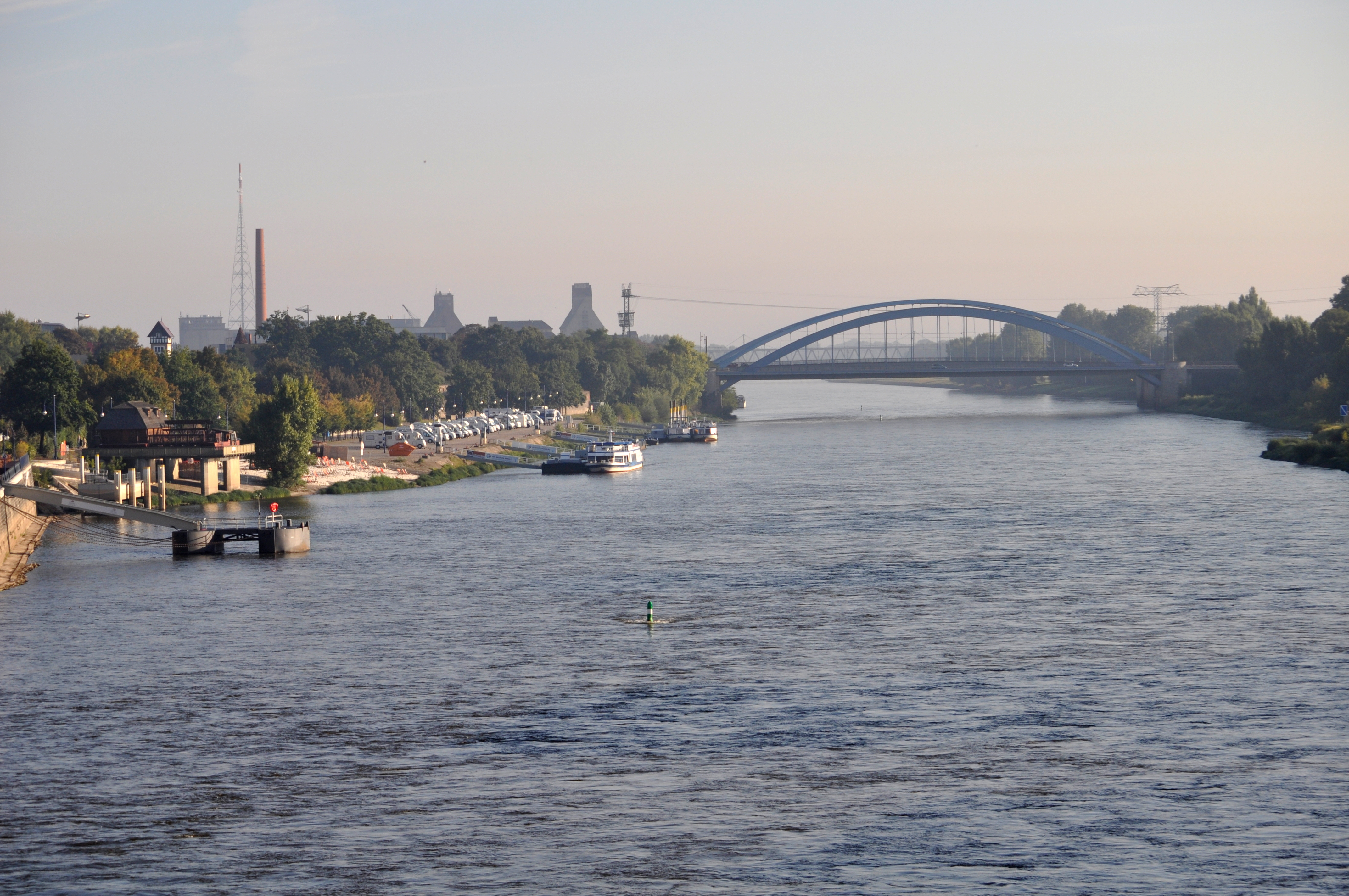 Blick von der Neuen Strombrücke auf die Stromelbe in Magdeburg.